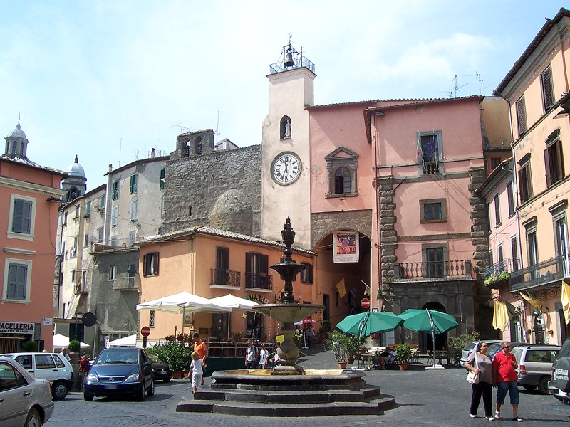 Montefiascone - Piazza Vittorio Emanuele II